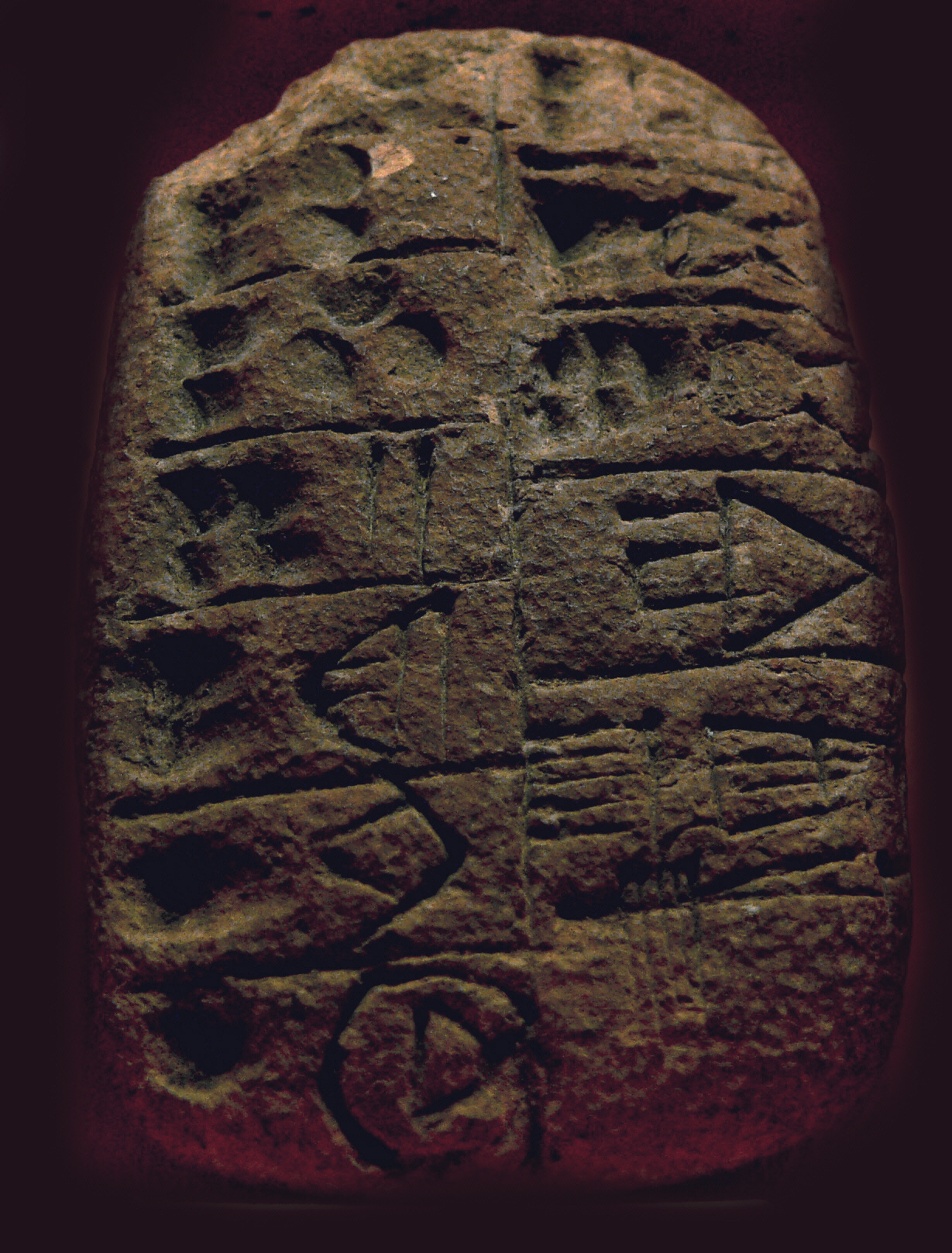 Tontäfelchen aus Mesopotamien, 3200 v. Chr., Auflistung von Getreideprodukten Staatliche Museen zu Berlin, Vorderasiatisches Museum, VAT 15246 Fotografiert in der Ausstellung "Am Anfang war das Formular", Museum für Kommunikation Frankfurt, 2008